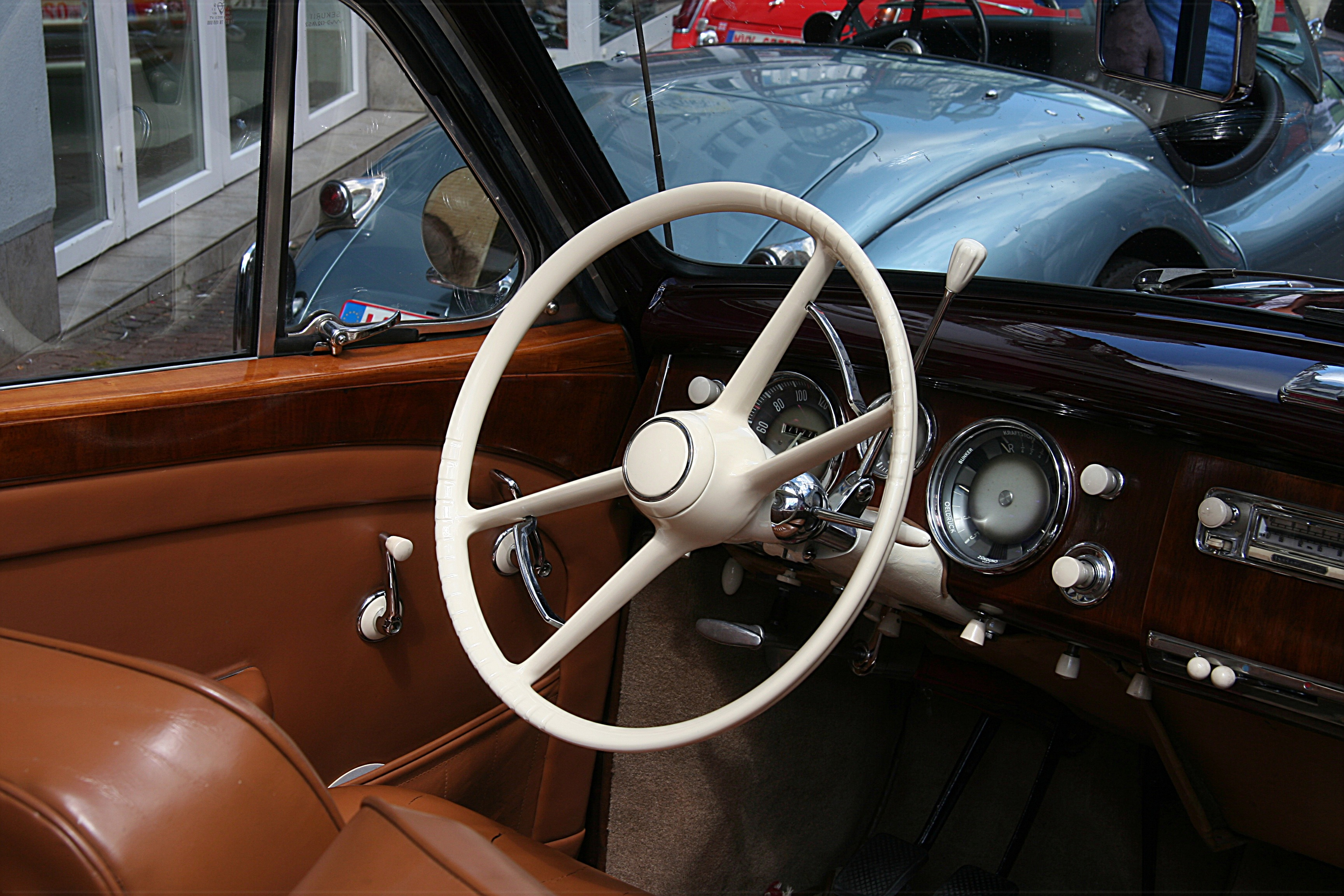 BMW 502 Baur-Cabriolet innen; zwischen den Lenkradspeichen die Tasten zur Betätigung der Hupe (als Kreissektor ausgeführt statt des in den 1950/60er Jahren modischen Huprings). Fotografiert in Montabaur bei 2000 km durch Deutschland.